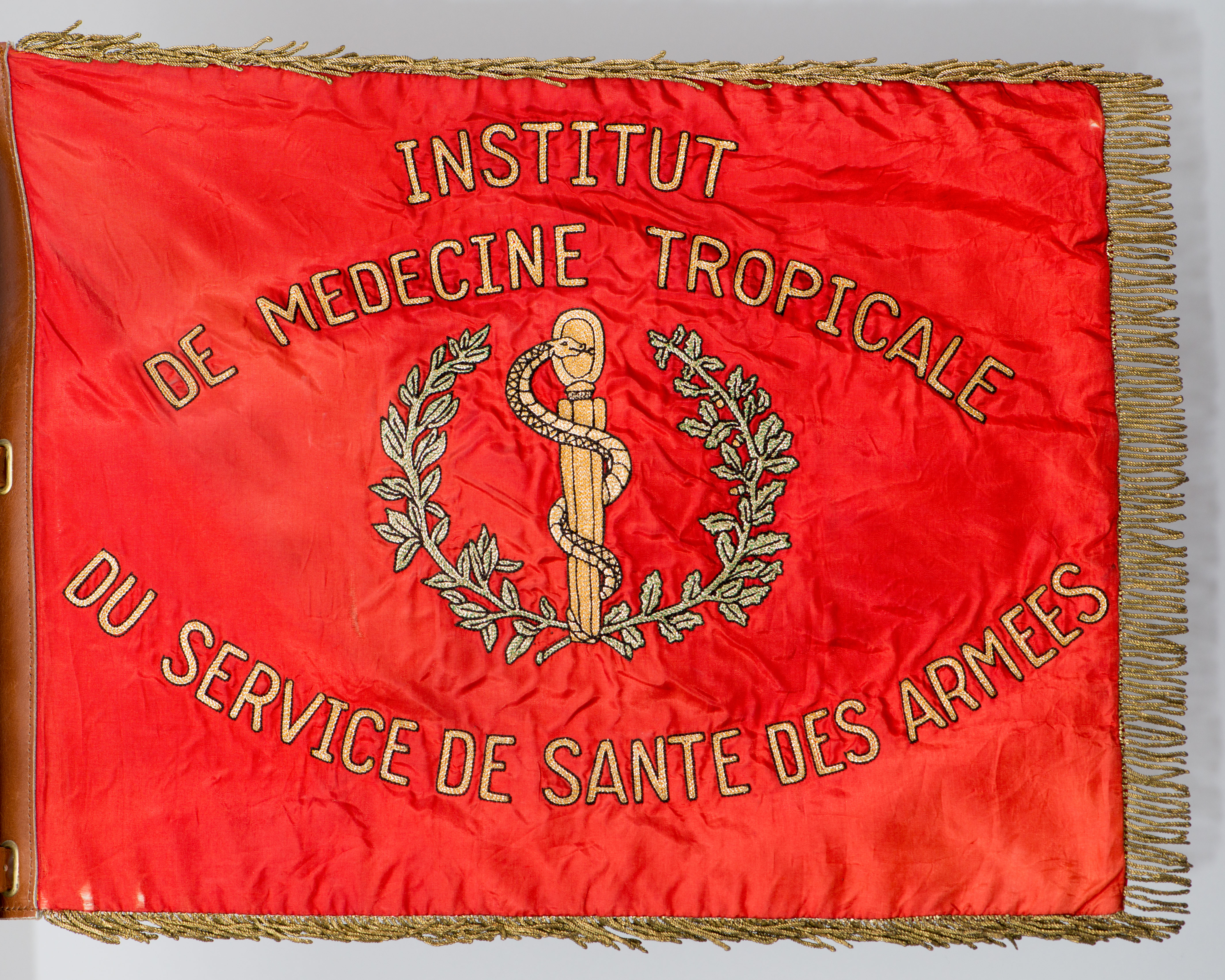 Fanion d'établissement militaire du service de santé français, de couleur rouge de tradition pour le service médical